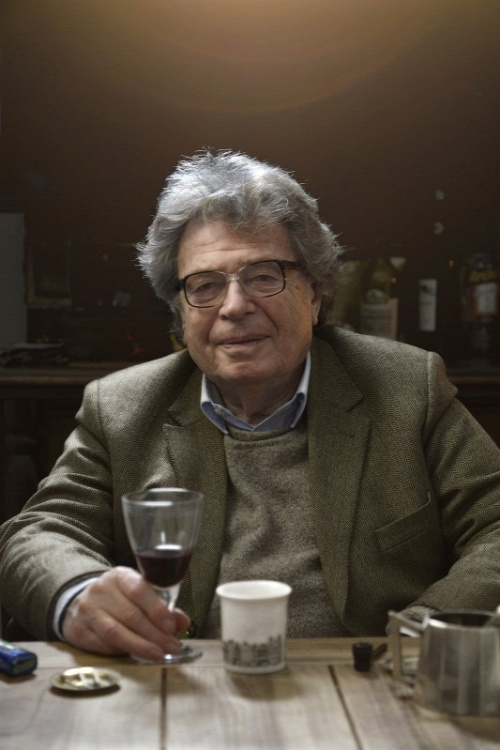 Konrád György magyar író.